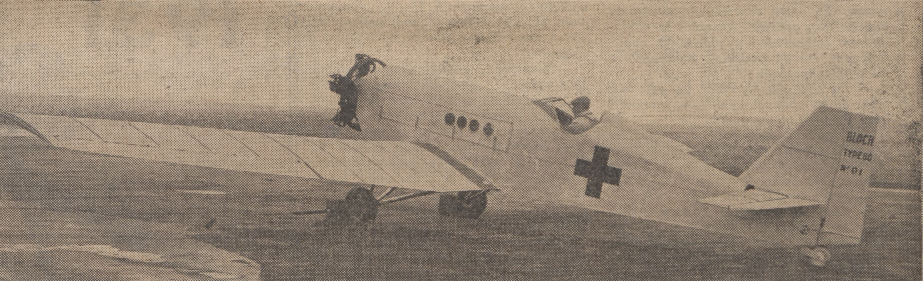 Le prototype Marcel Bloch 80 C'est un avion sanitaire qui, avec un moteur de 120 CV, monte à 5.000 mètres en 28 minutes. Il transporte, dans les meilleures conditions de confort, un blessé couché.